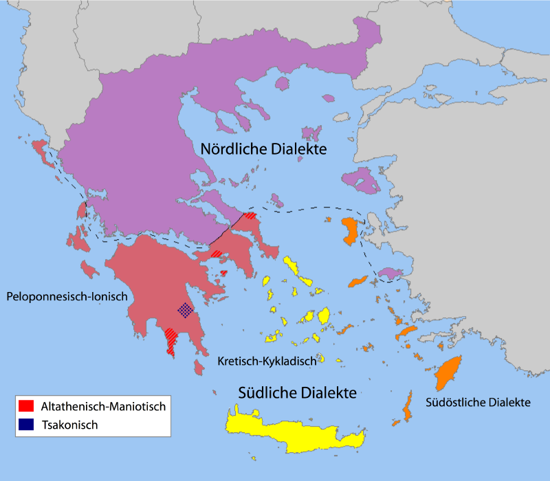 Dialekte in Griechenland / Modern Greek dialects map, de-version